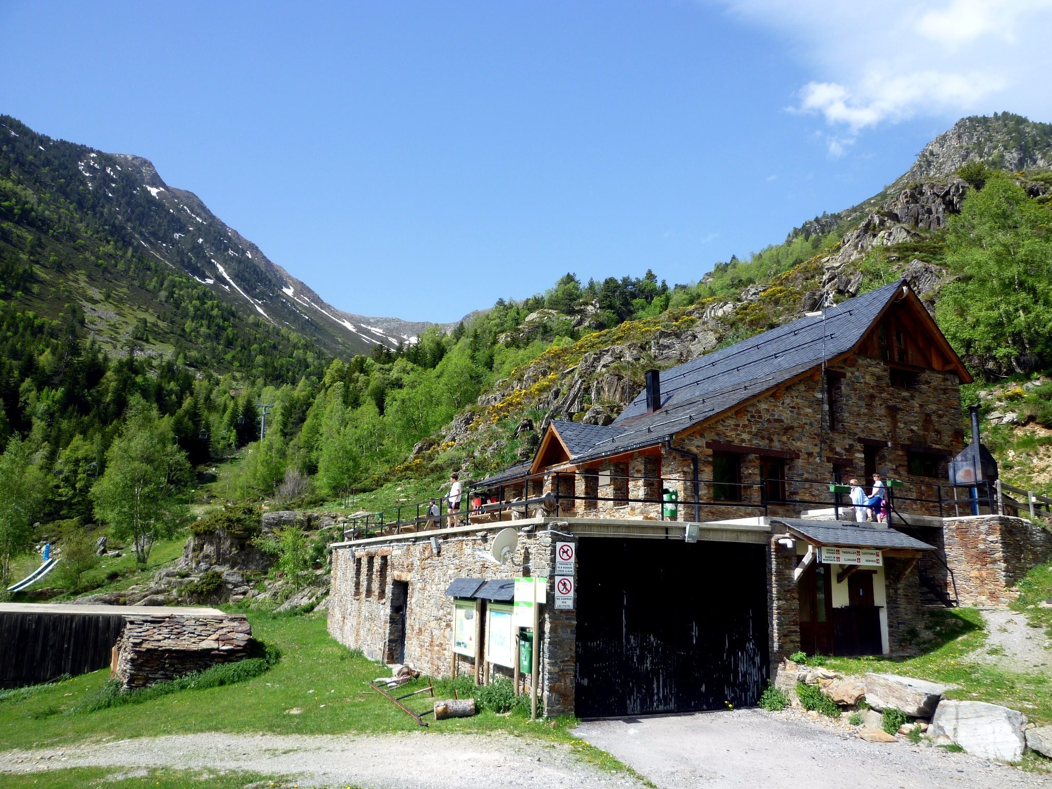 Refugi de la Pleta del Prat, a Tavascan (Pallars Sobirà)